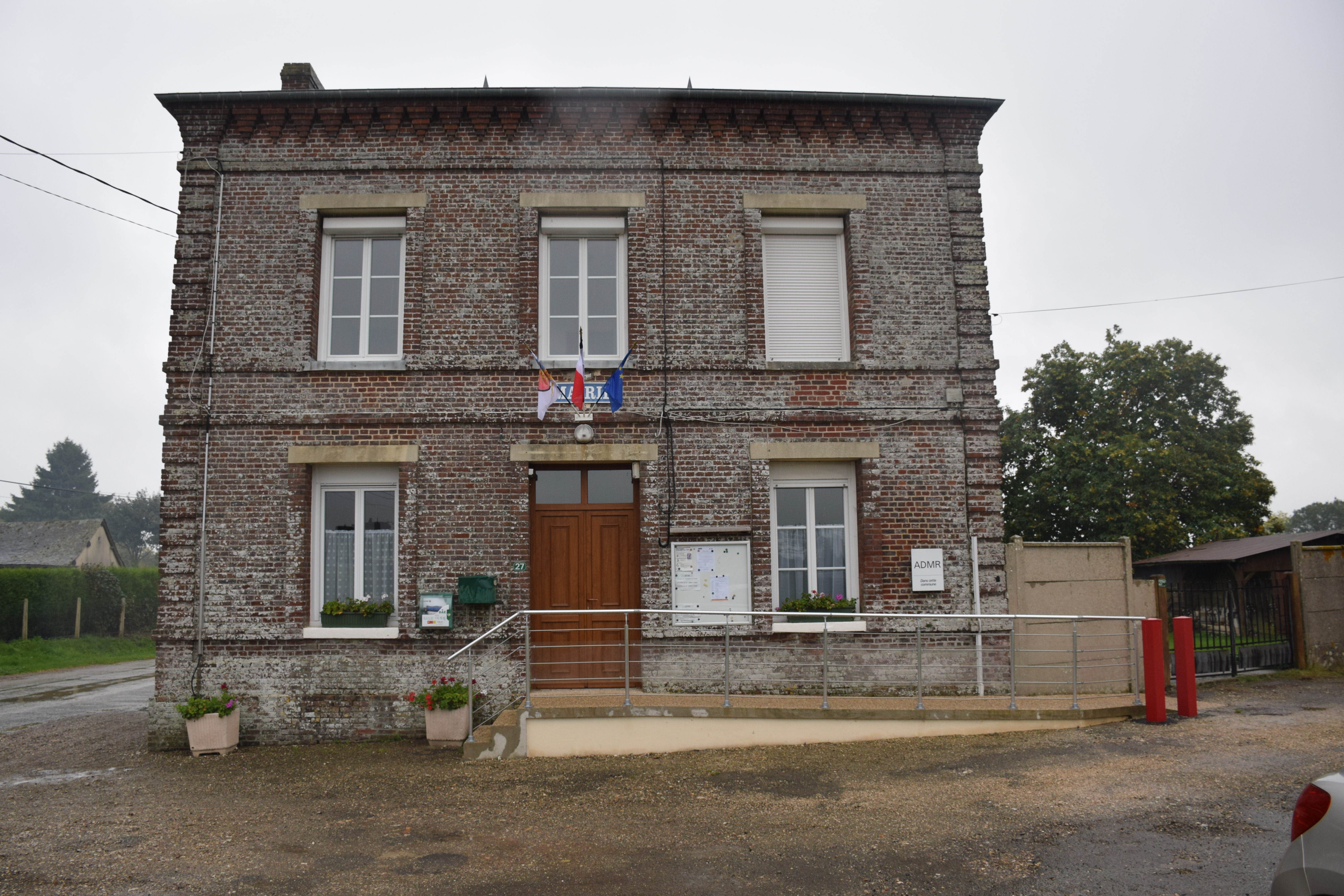 Mairie d'Aubéguimont 76